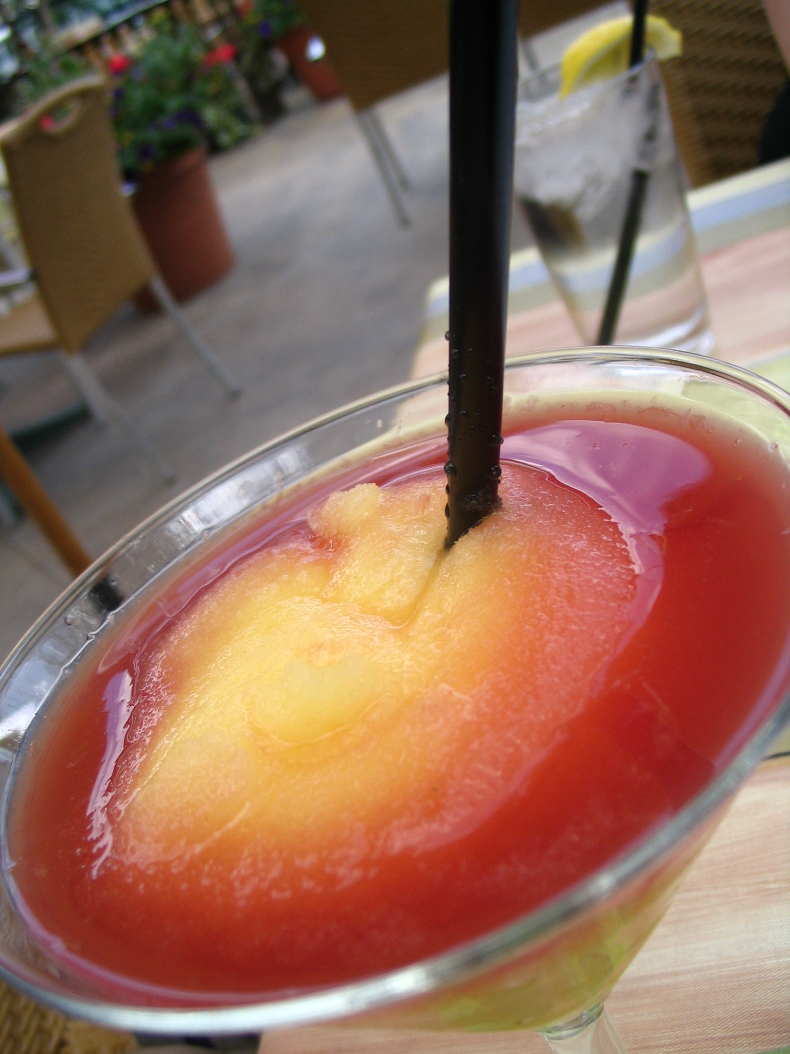 A Peach Bellini.